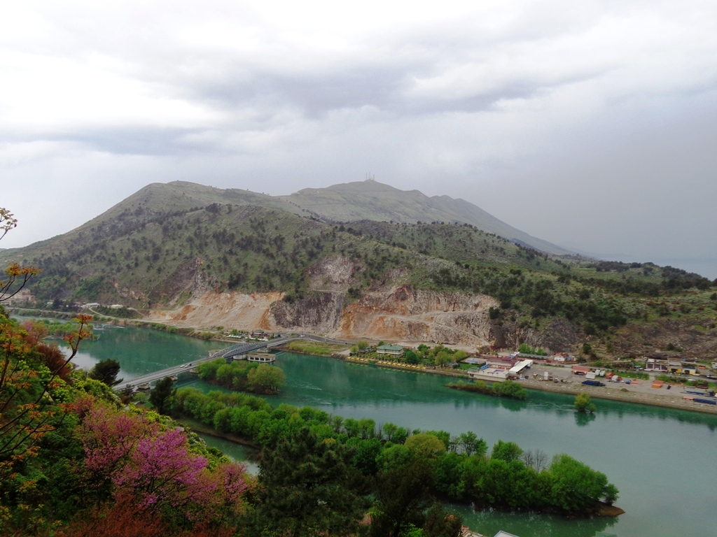 Ura mbi Bunë